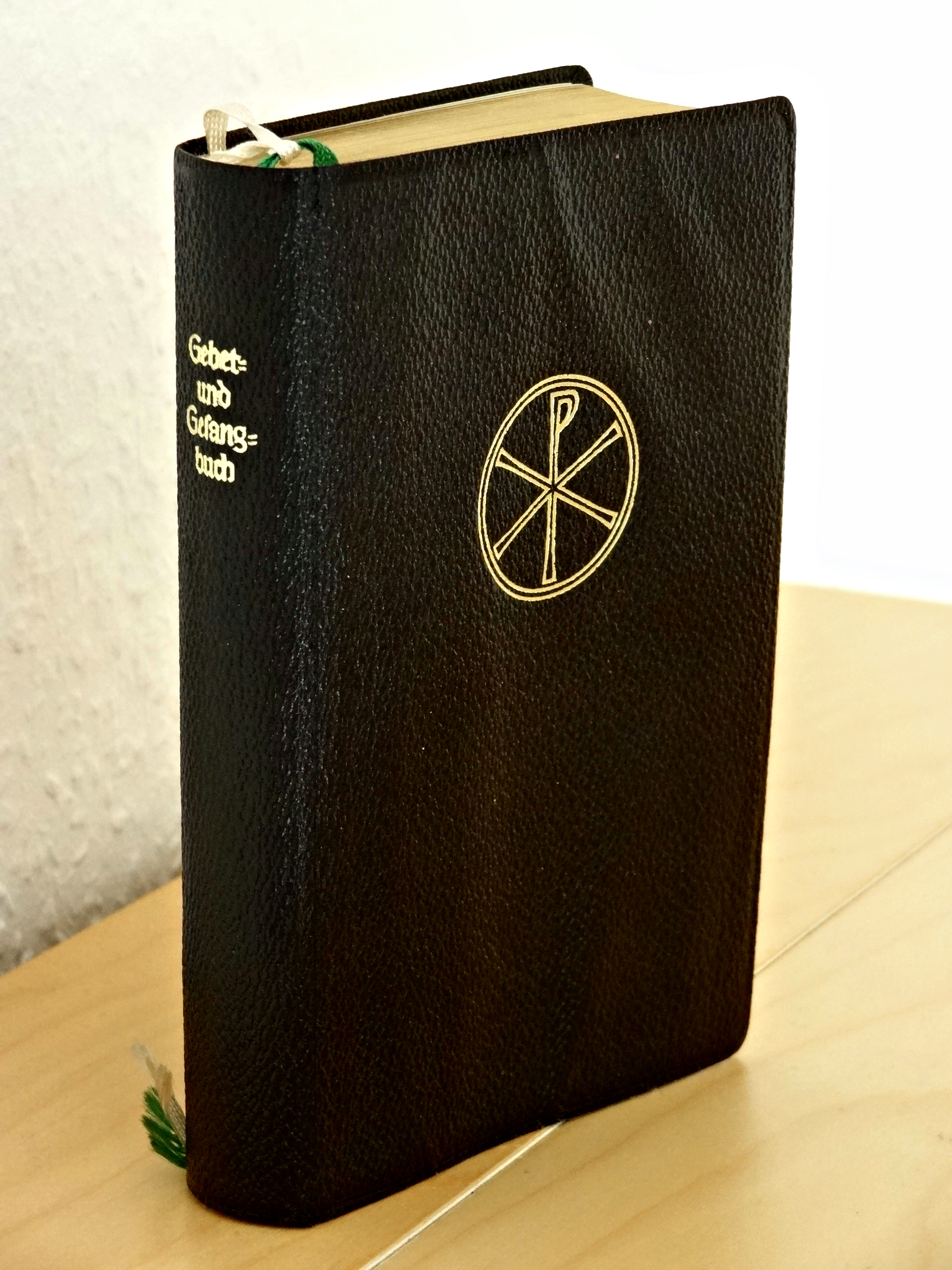 Gelobt sei Jesus Christus, Gebet- und Gesangbuch, herausgegeben vom bischöflichen Ordinariat Mainz im Matthias-Grünewald-Verlag Mainz, 26. Auflage 1968, Vorworte: Albert Stohr (1952), Herman Volk (1963), Anhang: Kirchenlieder unserer Brüder aus dem Osten